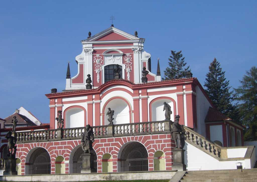 Sala terrena před zámkem v Klášterci nad Ohří, v pozadí kostel Nejsvětější Trojice